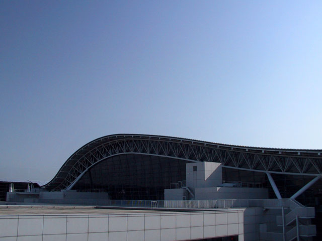 １＝關西國際機場的弧狀屋頂輪廓，关西国际机场是日本傾全力動用各式現代工程建築技術，在滄海中填出的現代奇蹟。為了彰顯這棟建築物的高科技感，其屋頂部分是採用金屬桁架支撐螺旋槳般曲線的輕量化薄殼，有著非常微妙的弧狀曲線。本圖片是由上傳者User:SElephant本人拍攝於2002年4月間。